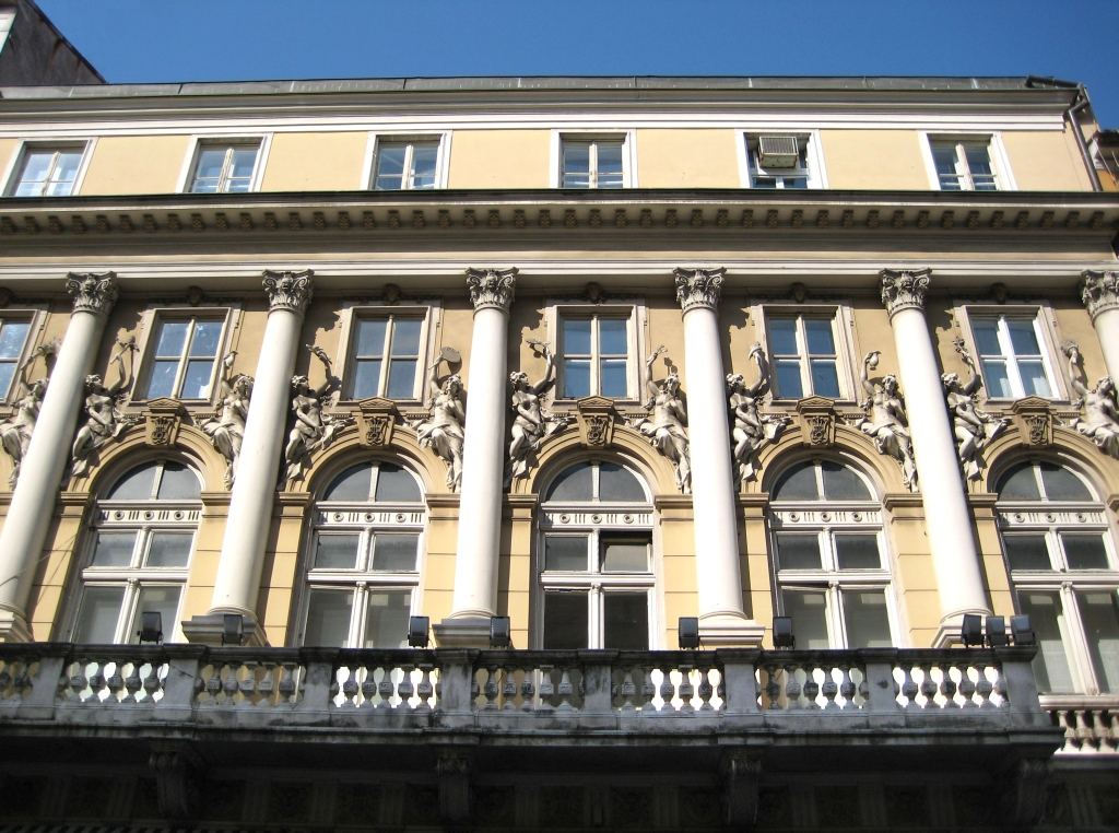 Zgrada Filodrammatice na Korzu u Rijeci